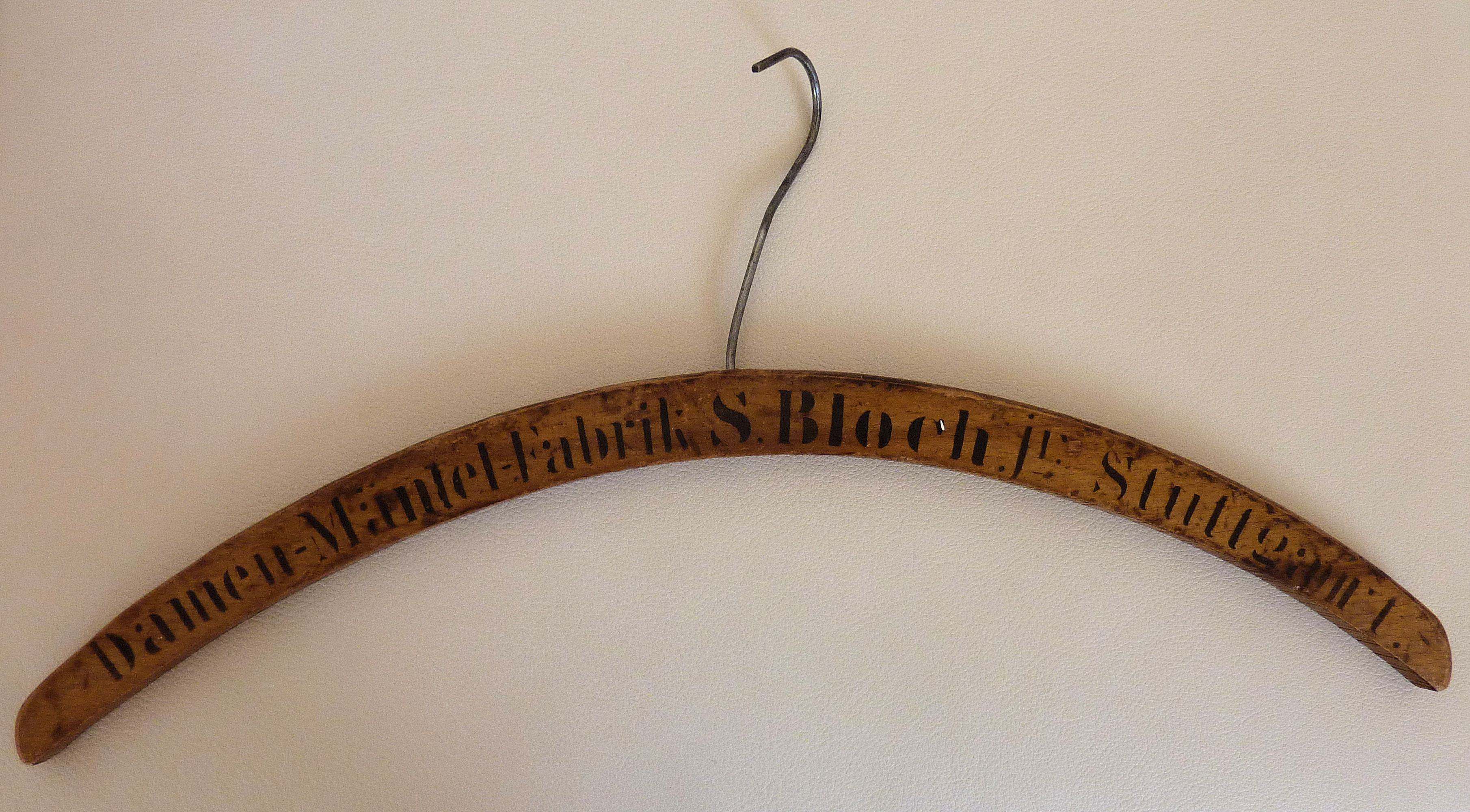 Kleiderbügel von S. (= Sally/Salomon) Bloch jr. in Stuttgart, Johannesstraße 66. Sally Bloch starb 1927; seine Witwe und seine beiden Söhne kamen in Konzentrationslagern um.